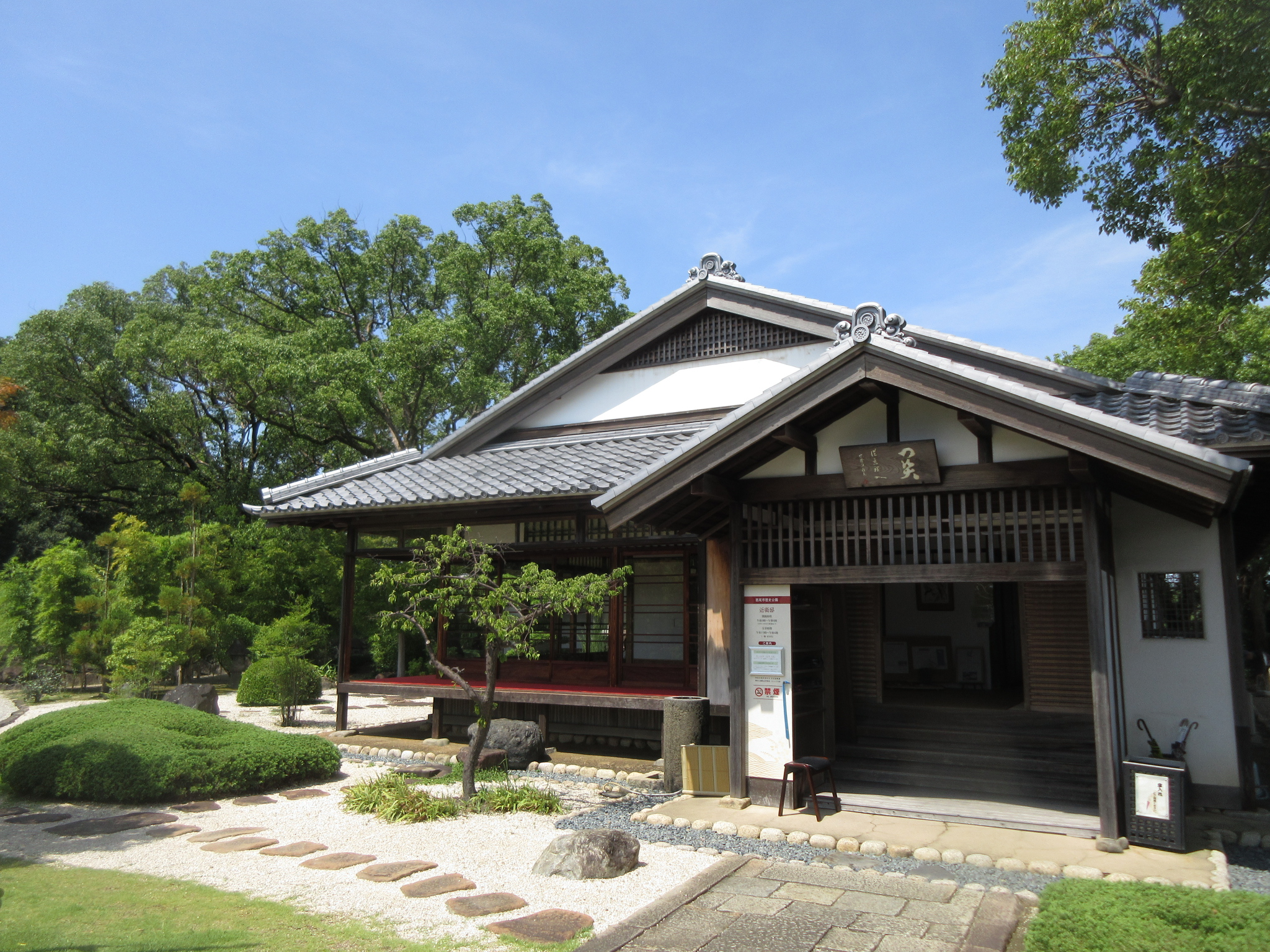 旧近衛亭（西尾市錦城町）